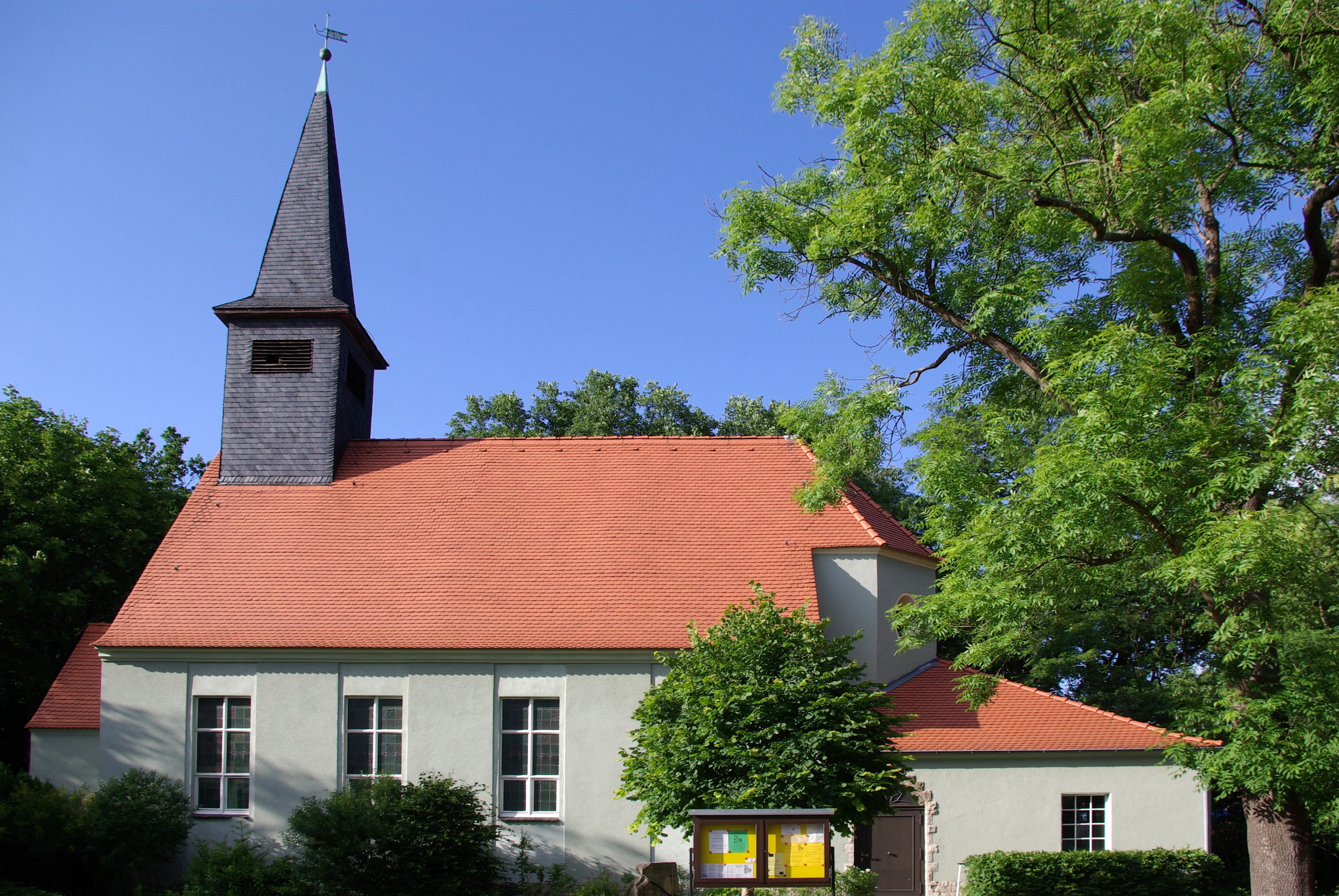 Grünheide (Mark), Ortsteil Hangelsberg. Die evangelische Dorfkirche stammt aus dem Jahre 1927/1928. Die Kirche steht unter Denkmalschutz.